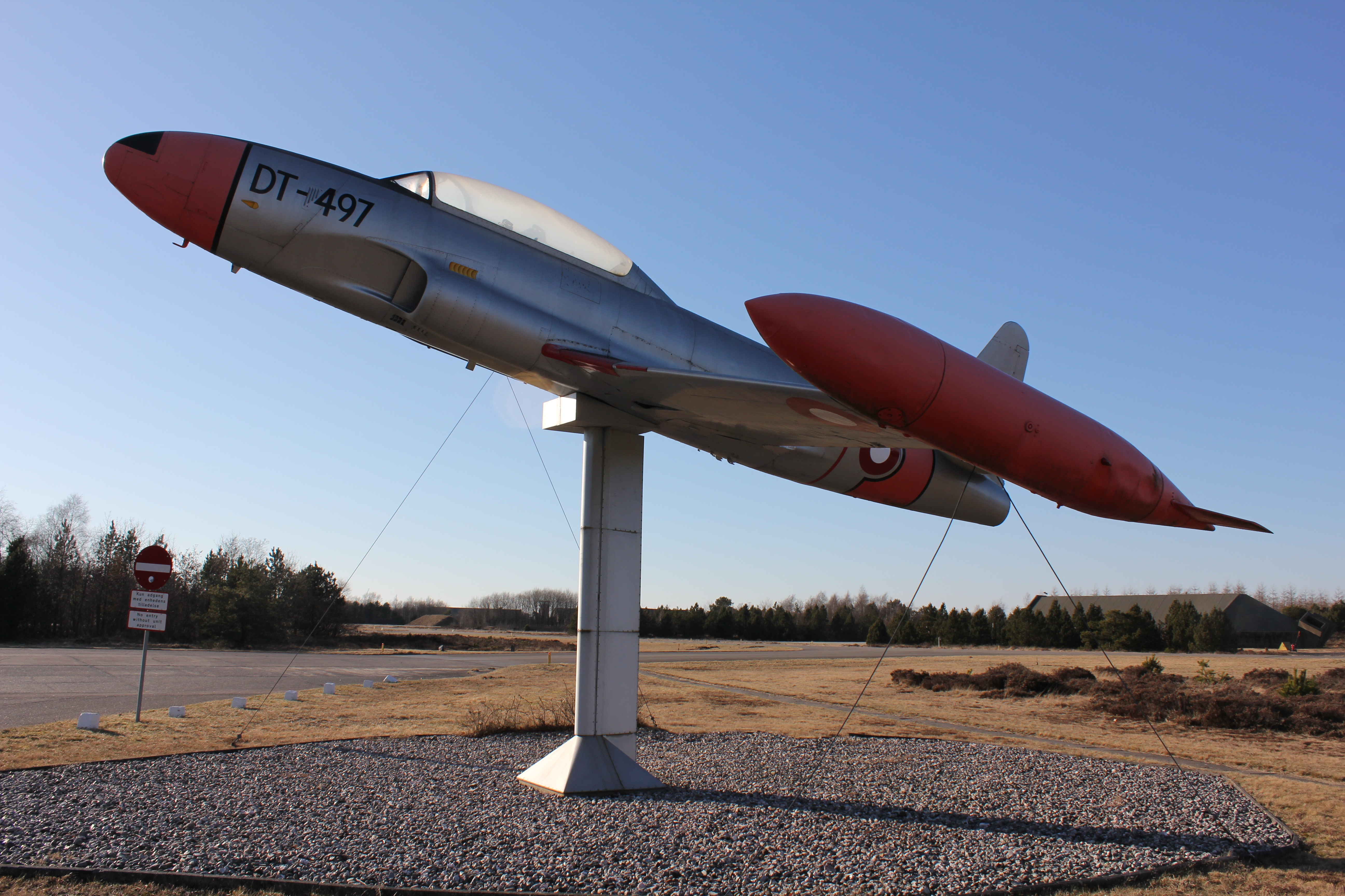 T33A på Flyvestation Karup